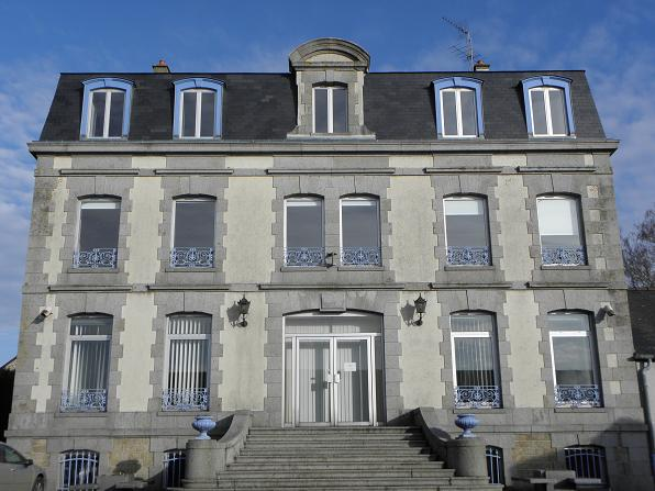 Mairie de Louvigné-du-Désert (35).